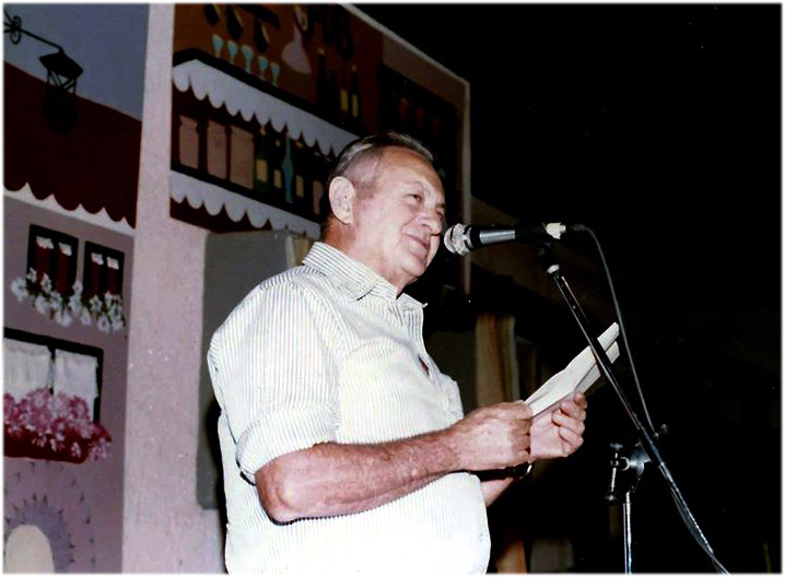 בצלאל גבר באירוע של ציבורי בעומר 1974